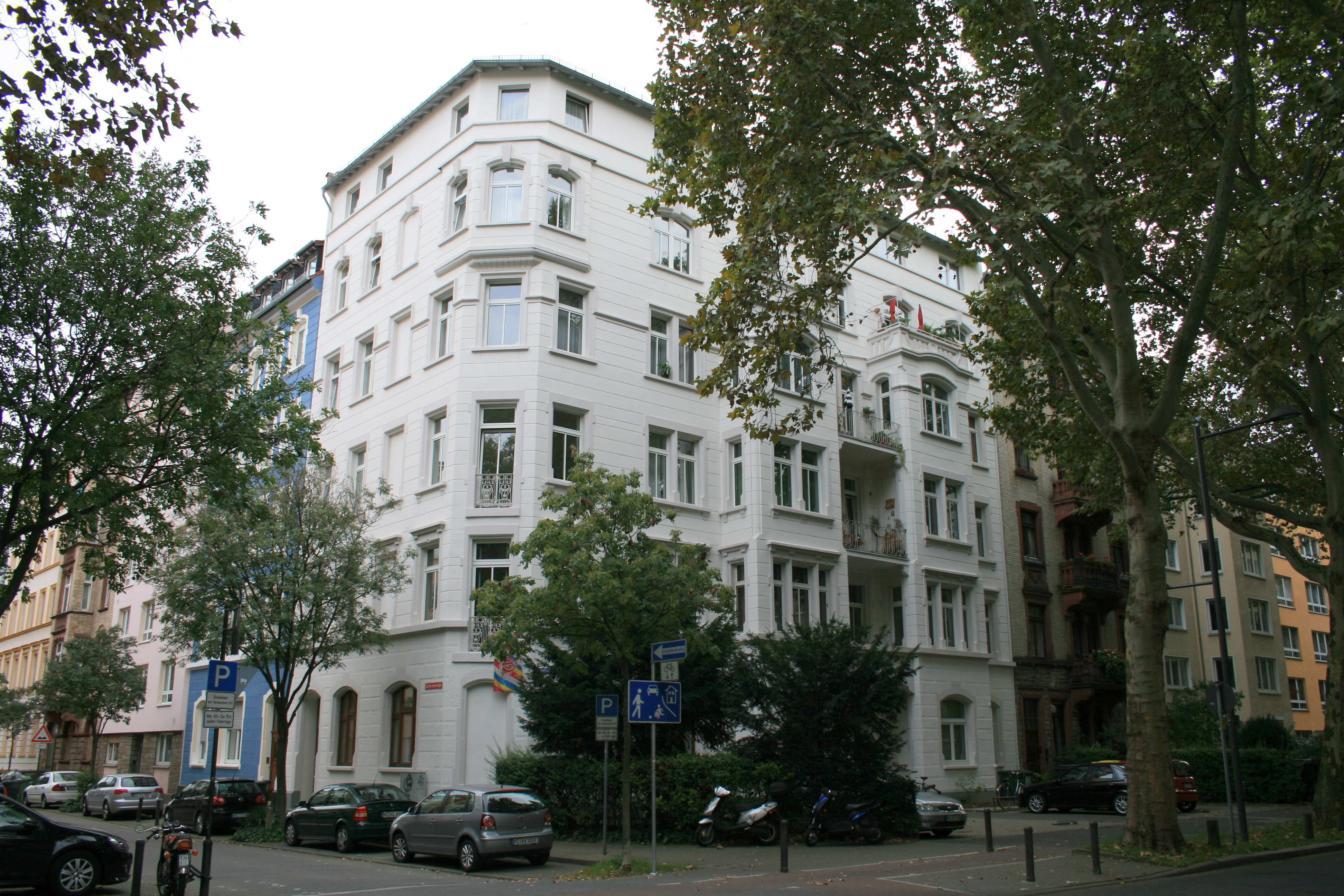 Mainz/Neustadt. Hindenburgstraße 28, Kurfürstenstraße 36 fünfgeschossiges Eckhaus mit aufwändiger Hauptfassade, Nachbarhaus schlichter, 1904, Architekt Wilhelm Hahn.